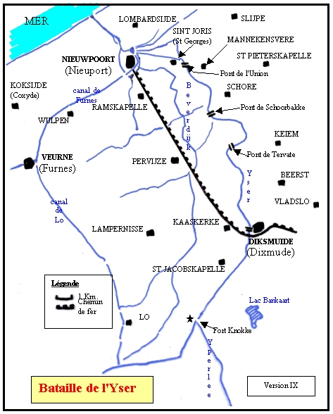 Yser carte